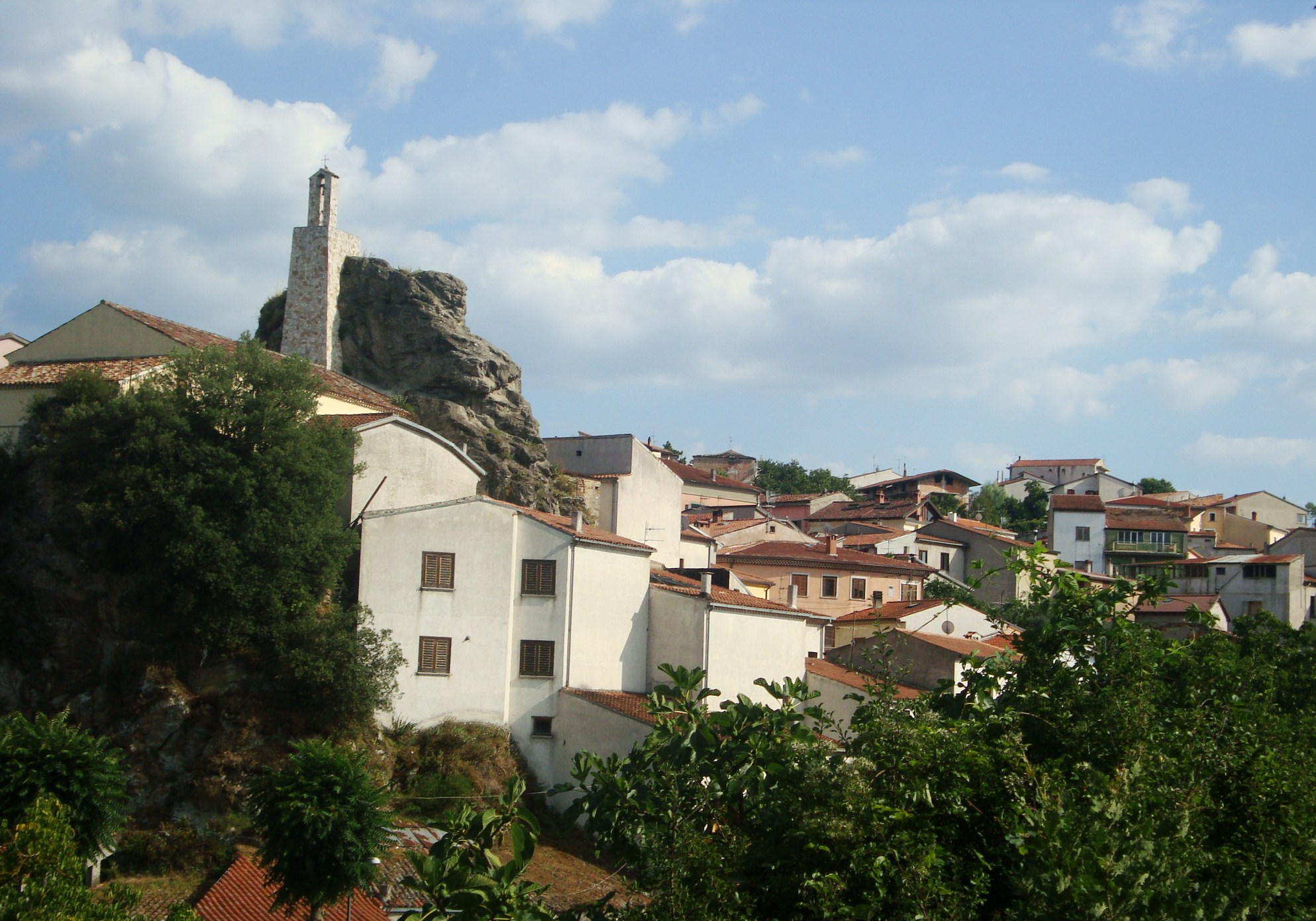 Campanile della chiesa della Madonna della Rocca, Satriano di Lucania, PZ